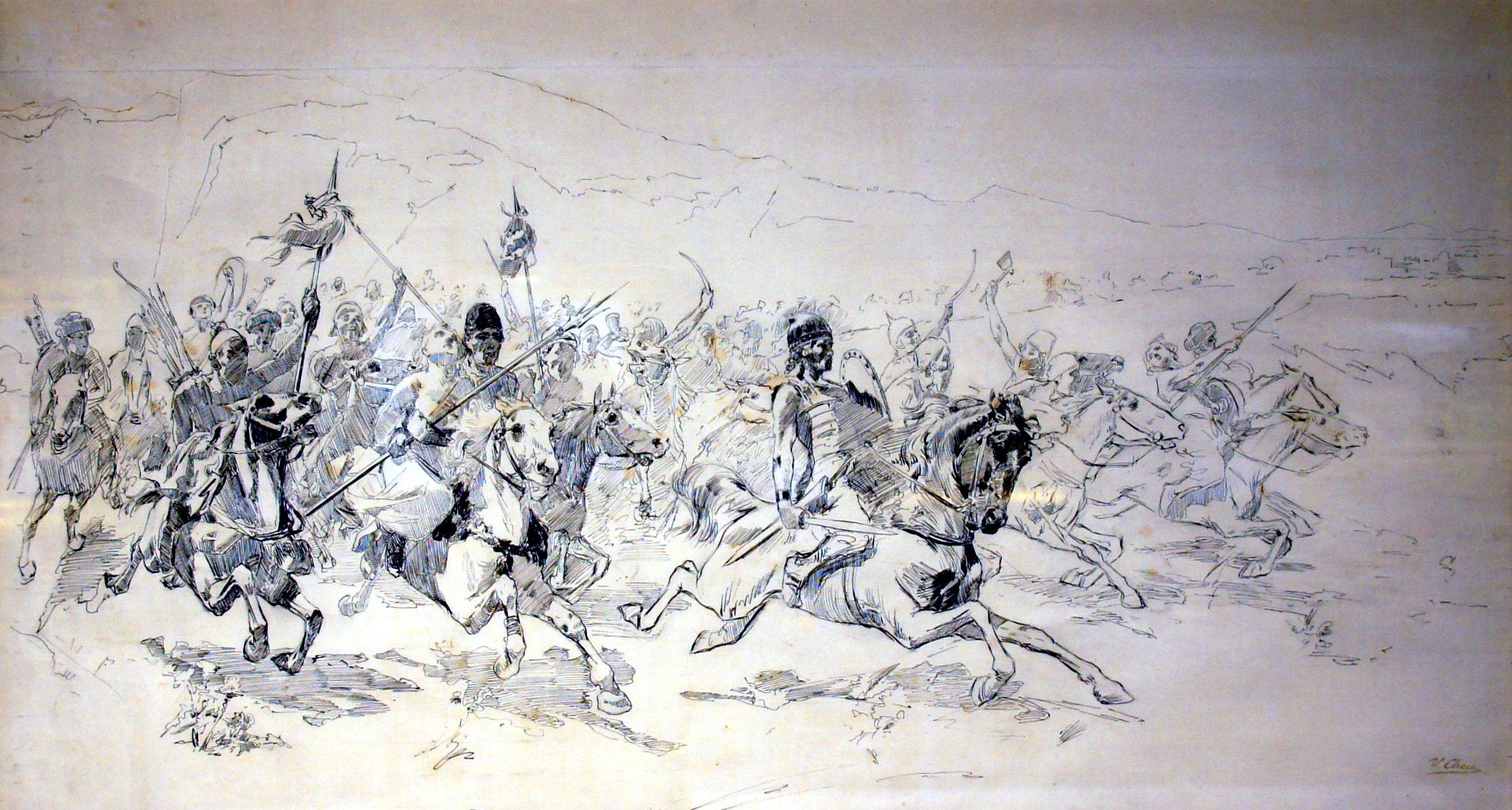 Atila y los hunos, tinta sobre papel, 65 x 103,5 cm. 1891. Firmado ángulo inferior derecho. El cuadro al óleo del mismo nombre, y del que esta tinta es un precioso dibujo preparatorio, fue presentado por Ulpiano Checa en el Salón de París de 1891, (sala XXII, nº 343 del catálogo). "...composición que sin duda tiene cpmp finalidad hacer admirar los efectos de un movimiento endiablado de una luz intensa y de un rico colorido. Hay que reconocer que estos efectos tienen una gran fuerza". ("Avenir militaire" 12 de mayo de 1891). La reciente publicación del museo Boijmans de Rótterdam "Spanish Master Drawing (1500-1900)" a calificado a Checa como uno de los cinco grandes maestros del dibujo español. Museo Ulpiano Checa. Donación de los hijos del pintor.